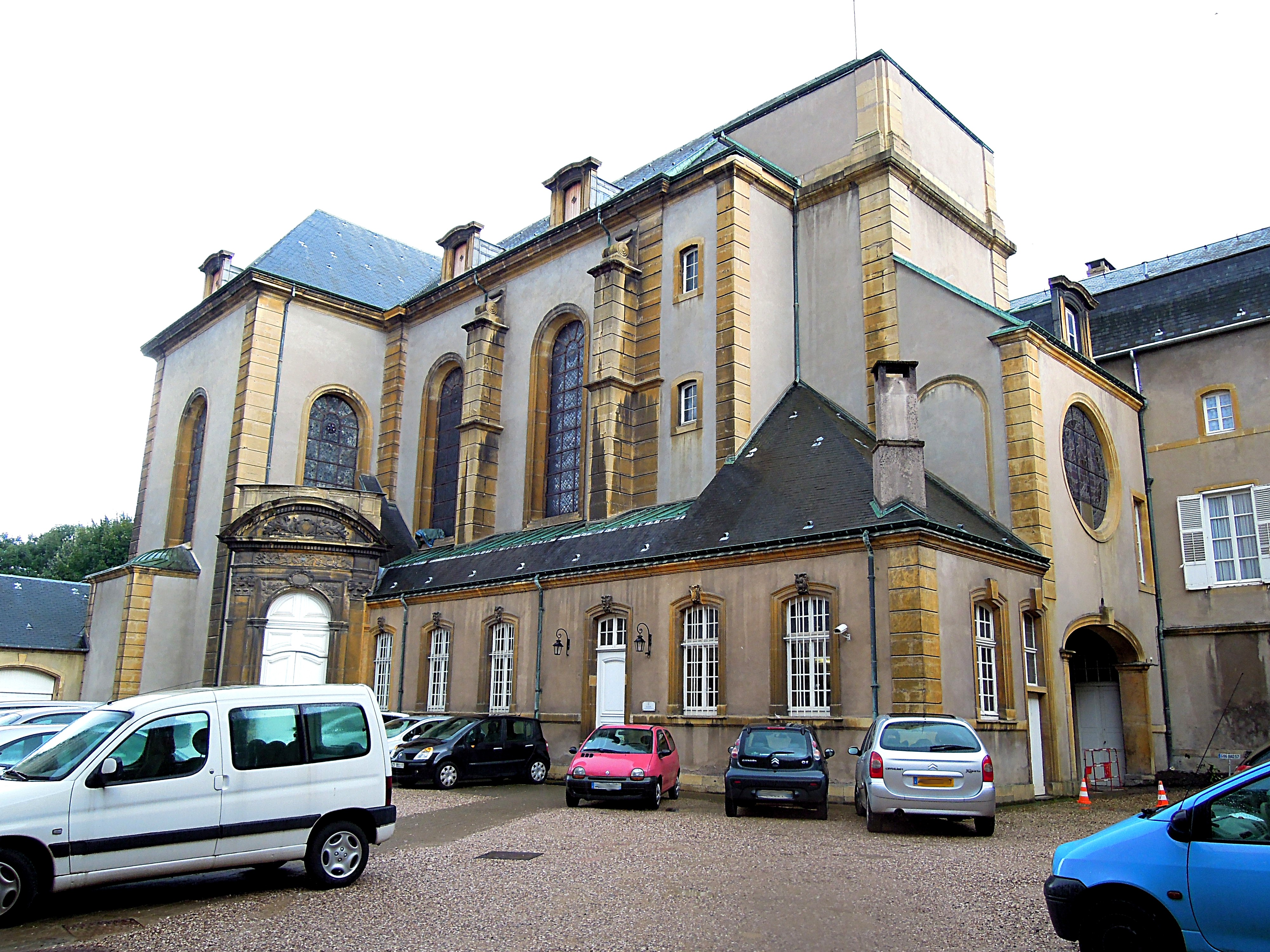 Chapelle Sainte-Glossinde. Construction 1752-57. Abbaye fondée au 7ème s par les sœurs bénédictines. L'ensemble abrite aujourd'hui l'administration diocésaine.